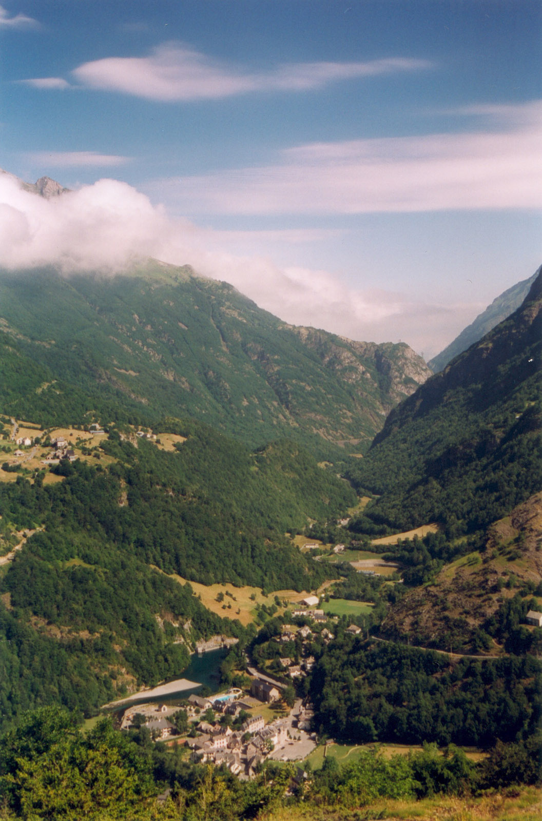 Gedre Auteur GIRAUD Patrick